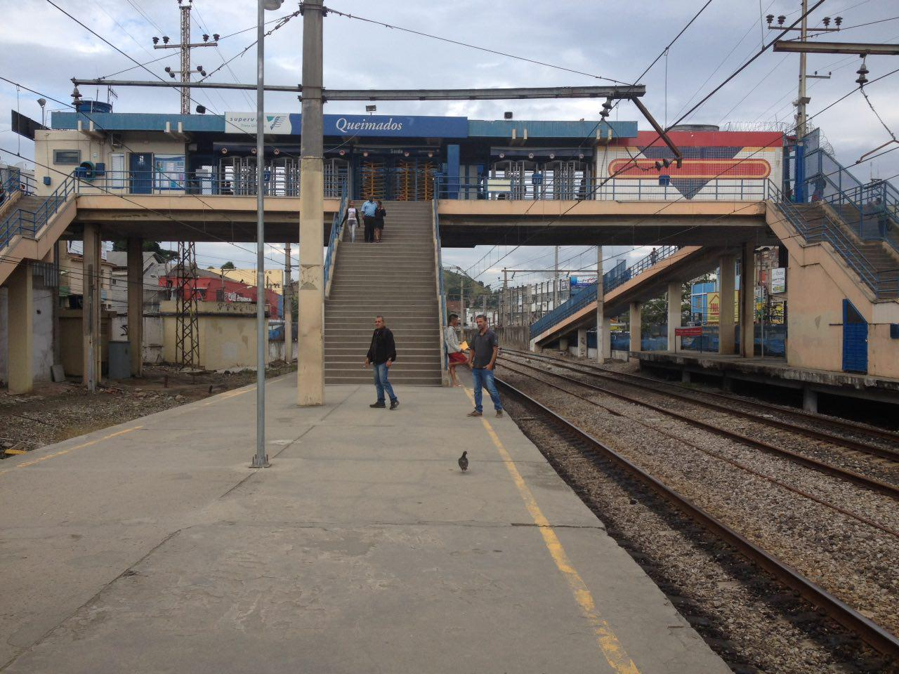 Estação Queimados 2015